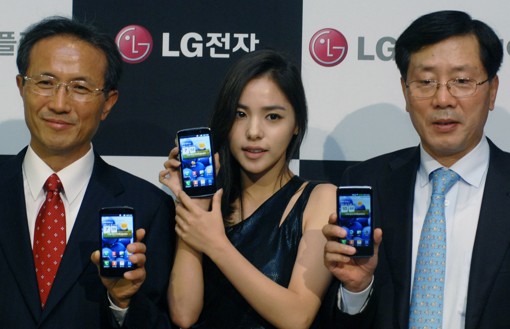 LG전자와 LG디스플레이는 10일, 그랜드 하얏트 호텔에서 「IPS True HD」디스플레이를 탑재한 ‘옵티머스 LTE’를 소개하는 행사를 열었다. LG디스플레이 여상덕 Mobile/OLED본부장(왼쪽부터), 배우 민효린, LG전자 나영배 MC사업본부 한국담당이 기념촬영을 하는 모습. ※ LG전자 뉴스룸 에서 관련 보도자료를 확인실 수 있습니다.